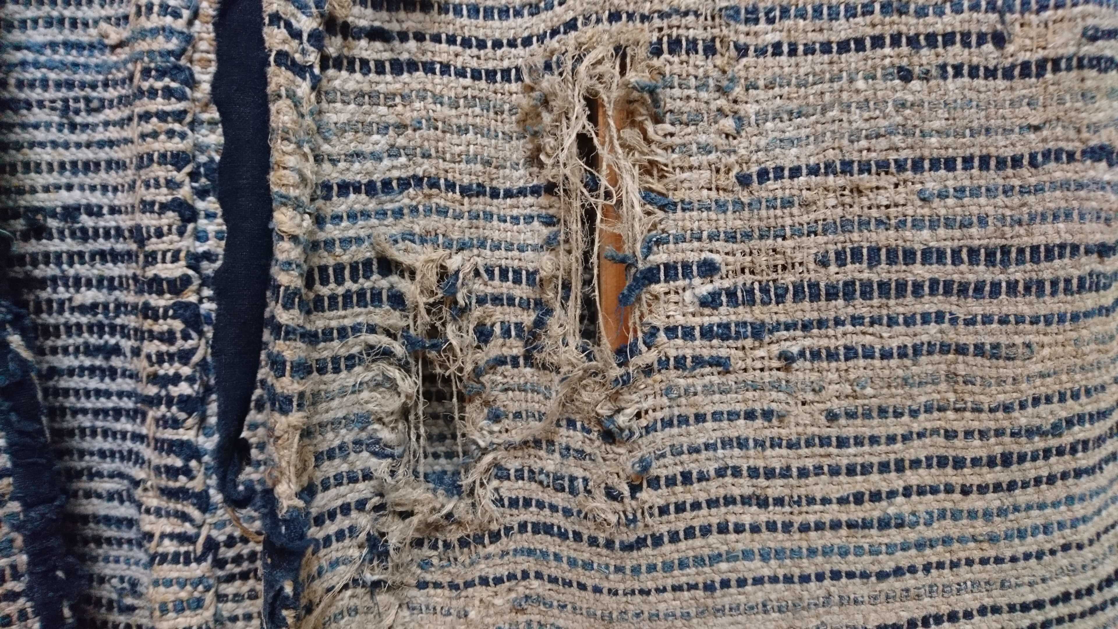 経糸に藤糸を用いた裂き織（原始布古代織参考館所蔵）